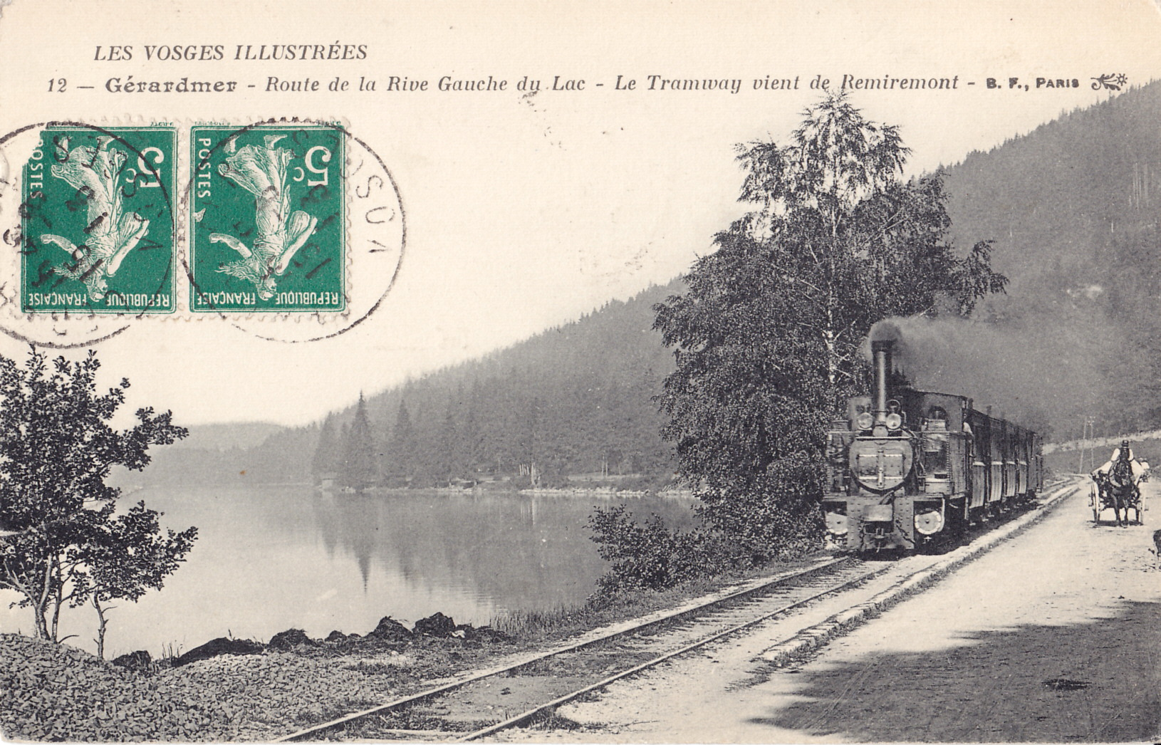 Carte postale ancienne éditée par BF à Paris, collection Les Vosges illustrées, n°12 :GERARDMER - Route de la Rive Gauche du Lac - Le Tramway vient de Remiremont.